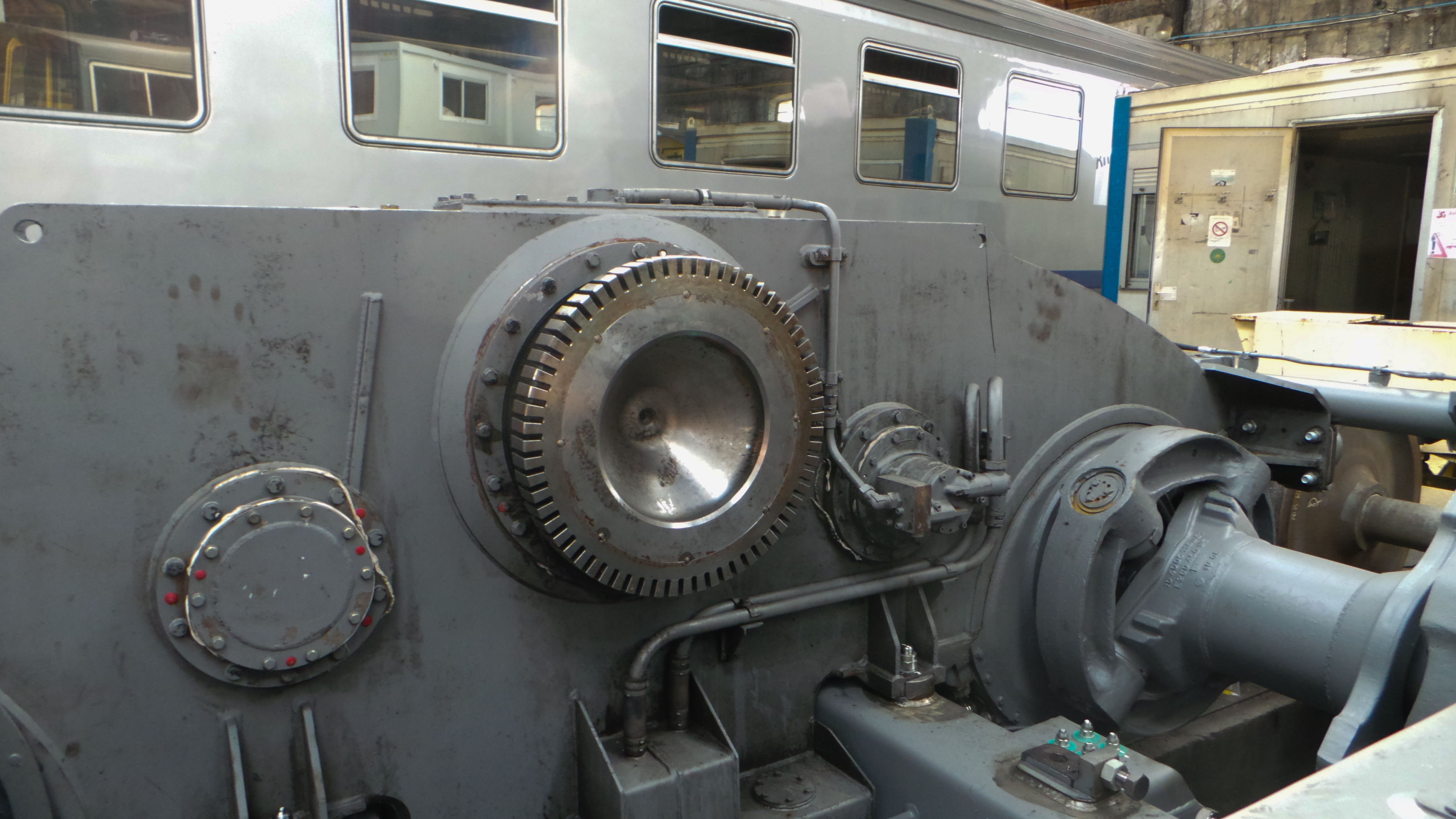 Un bogie Jacquemin dans la rotonde du dépot SNCF de Chambéry / Chambéry, Savoie, France